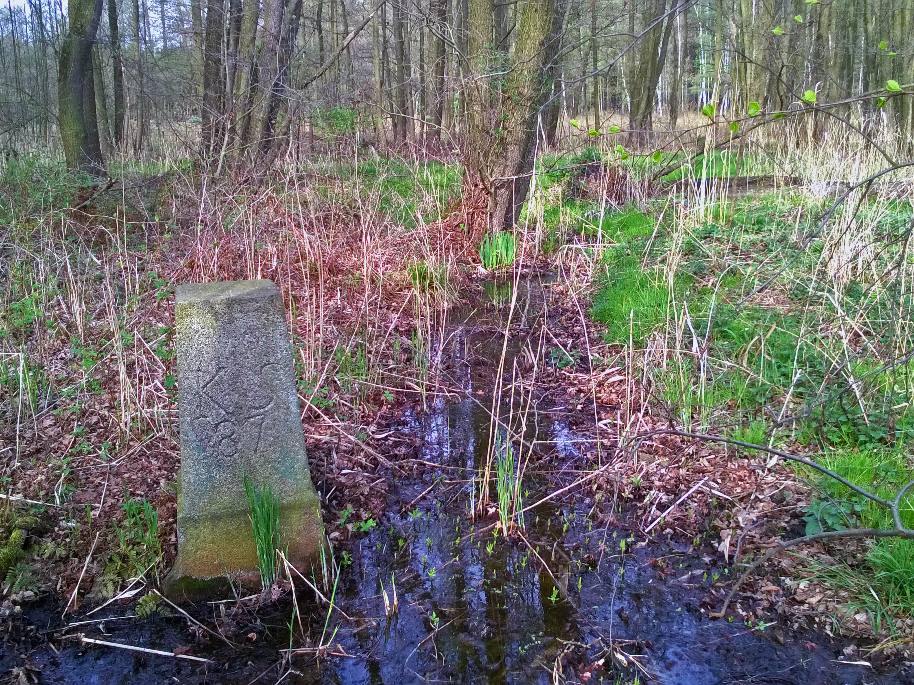 Grenzstein Nr. 87 Historische Landesgrenze Königreich Sachsen Königreich Preußen 1815 (Wiener Kongress) Hornjoserbsce: Historiski saksko-pruski měznik čo. 87 wosrjedź Komorowskich hatow